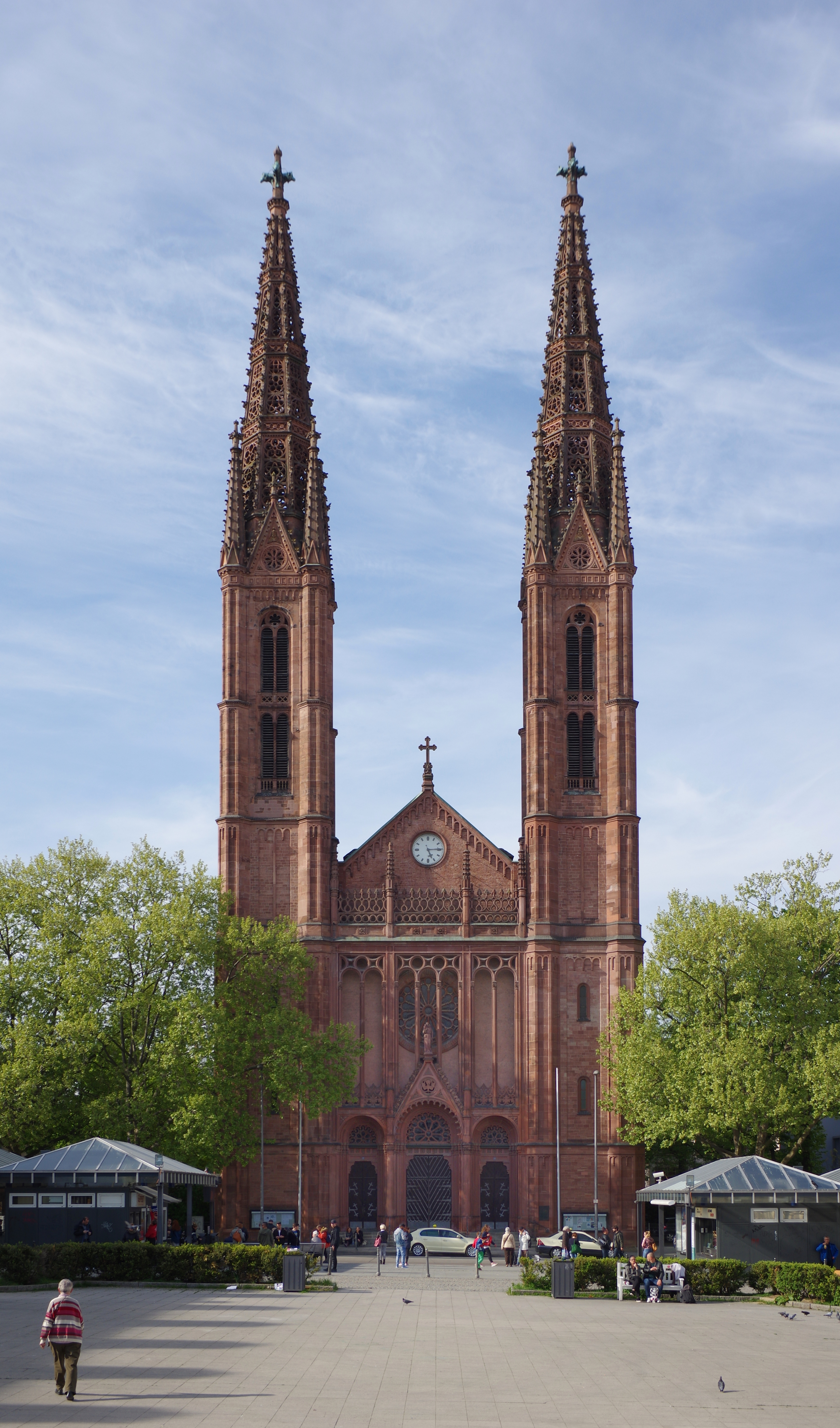 Deutschland, Wiesbaden, St. Bonifatius